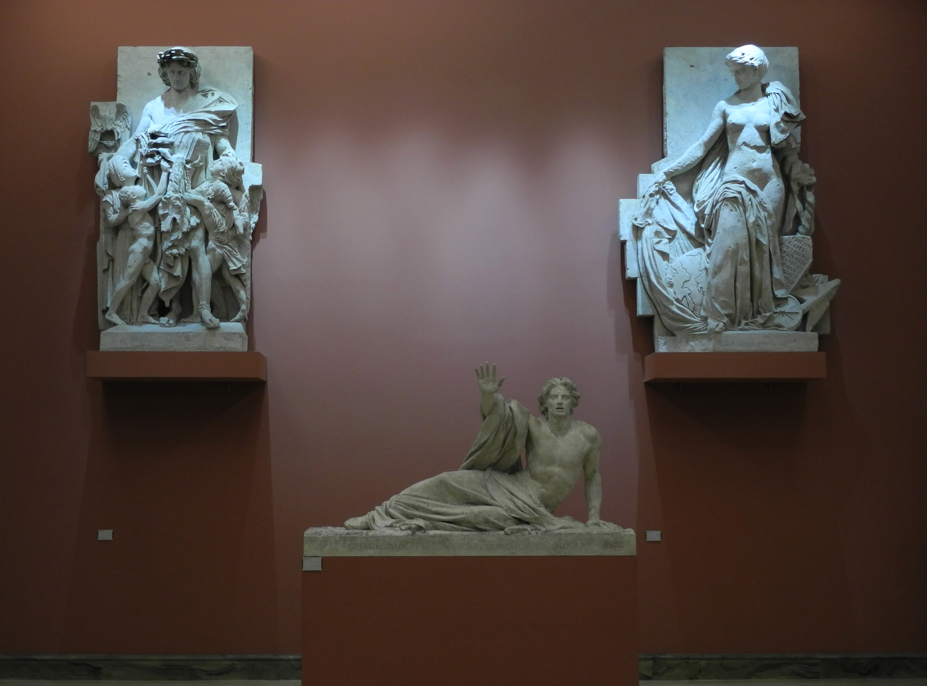 Allégories du commerce et de la navigation encadrant la statue de Bonchamps, œuvres de David d'Angers, Rouen, musée des beaux-arts